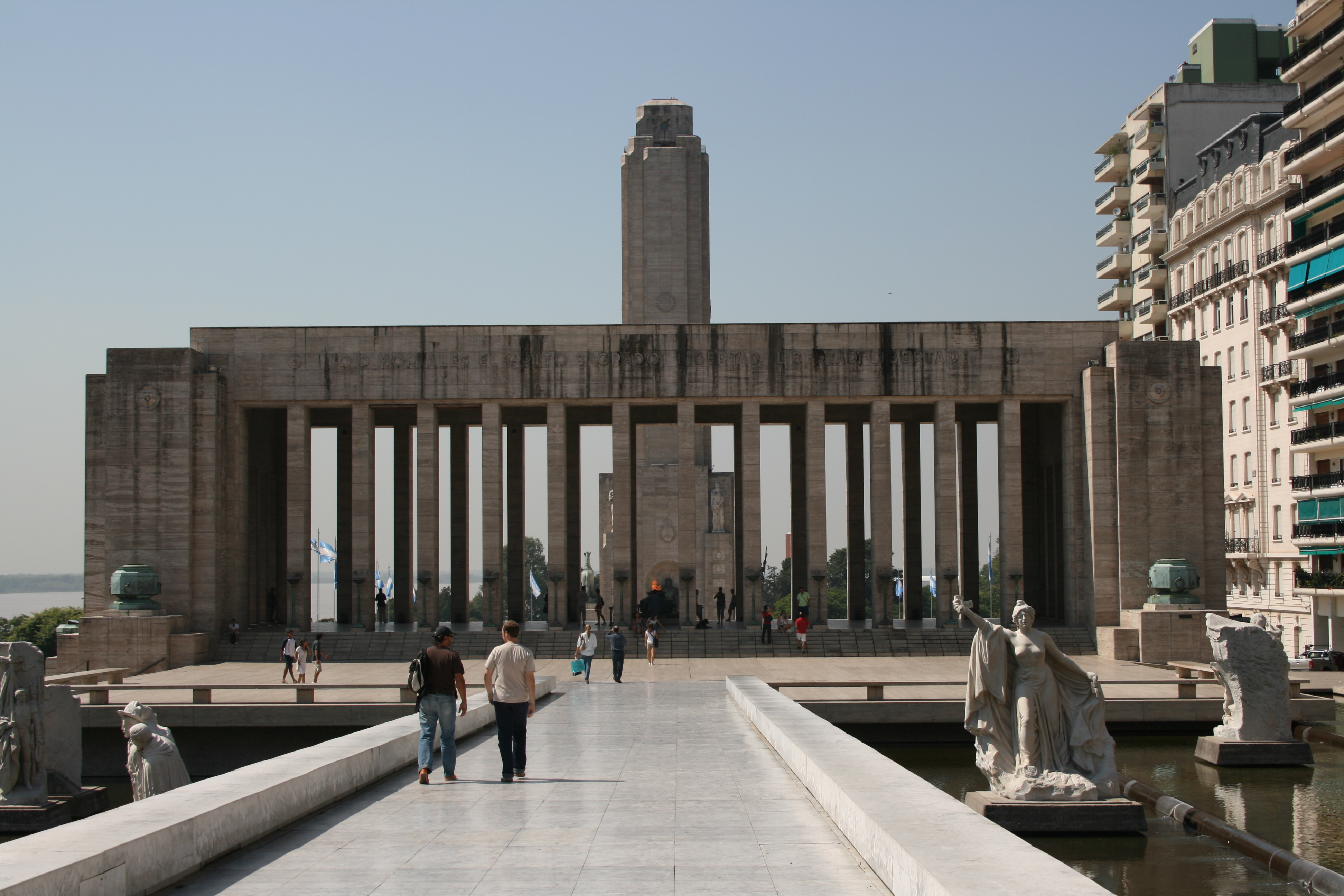 Flag Monument in Rosario